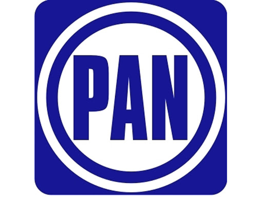 pan